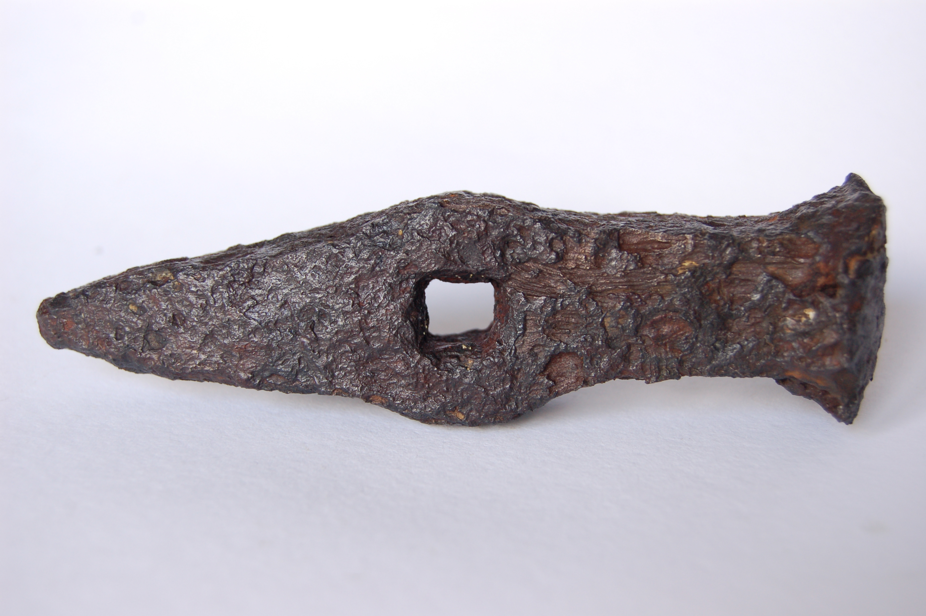 Żelazo górnicze - ok. XVI w. Złoty Stok (Reichenstein)